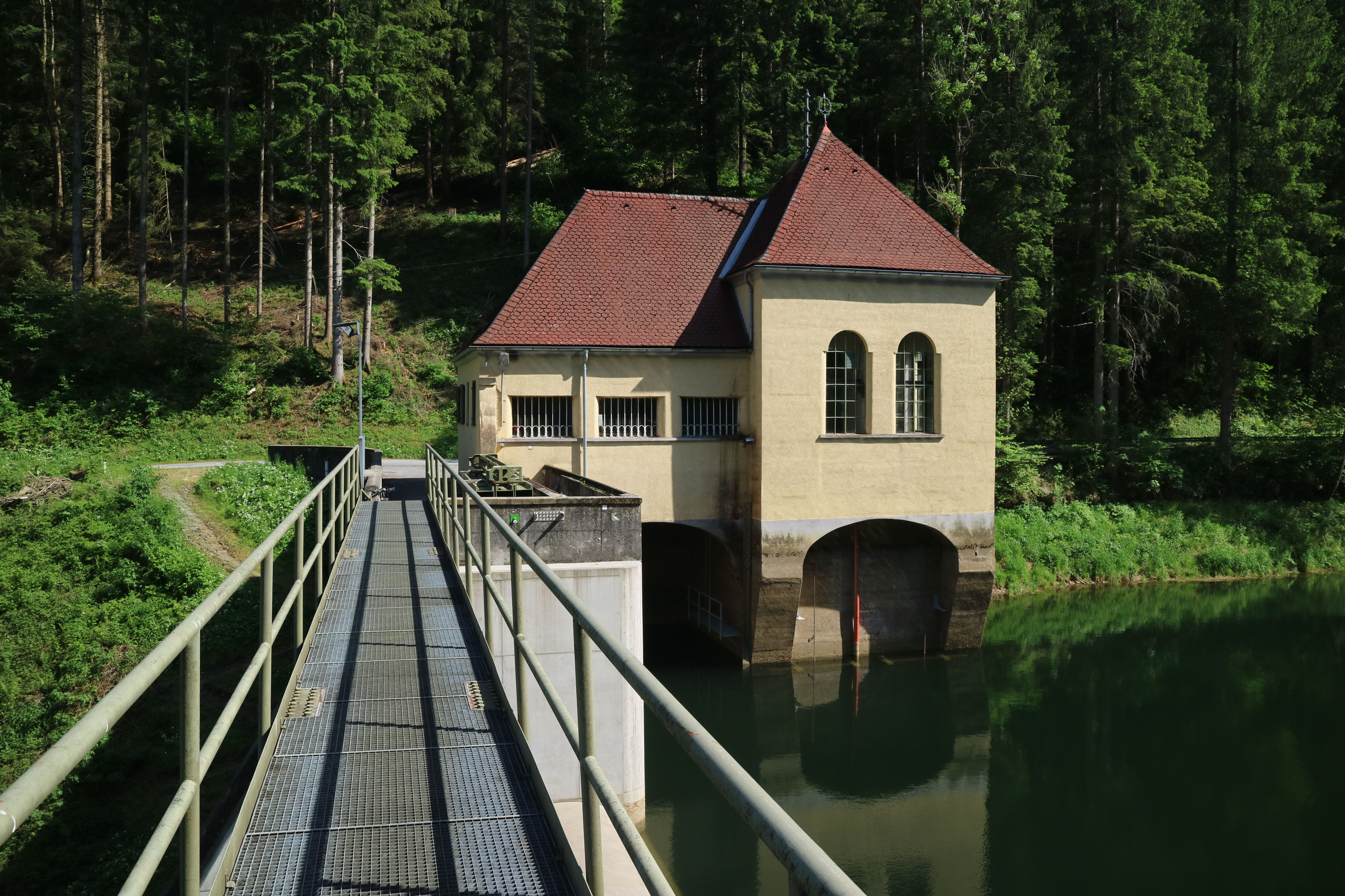 Langmannsperre, Gemeinde St. Martin am Wöllmißberg, Steiermark